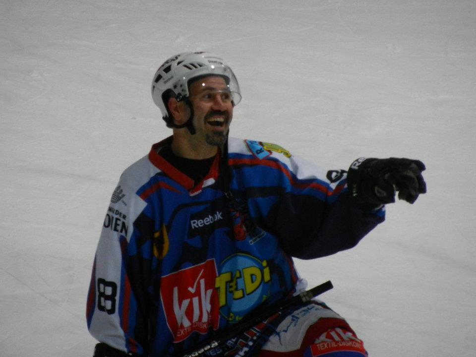 Frank Petrozza #88 (EHC Dortmund) - Saison 2011/12